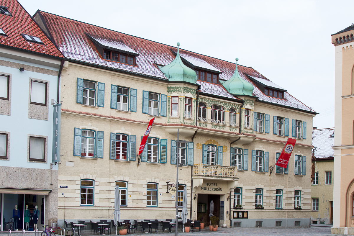 stattliches Eckgebäude mit zwei Zwiebelturm-Erkern und pflanzlichem Jugendstil-Dekor, erbaut 1858, aufgestockt 1903. An der Südostecke Marienfigur, Ende 19. Jahrhundert